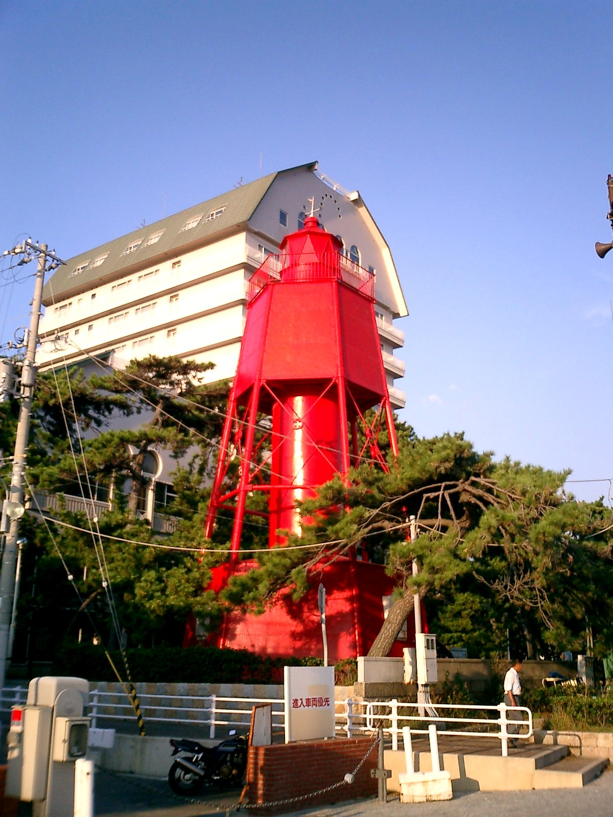 Wadamisaki_lighthouse